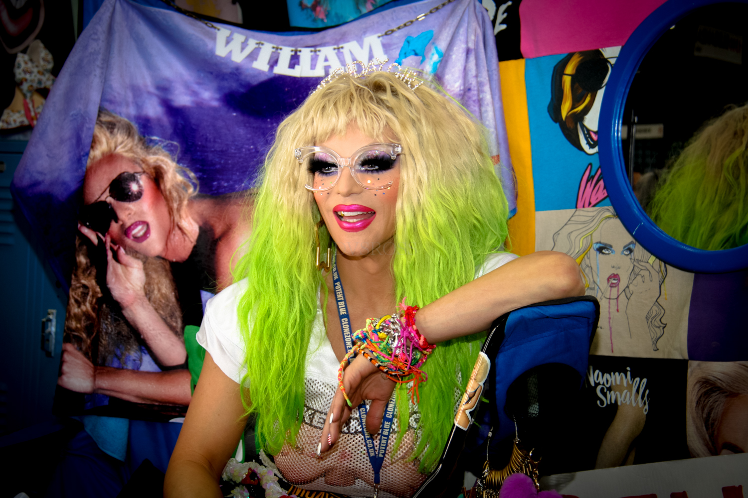 Rupaul's DragCon 2019